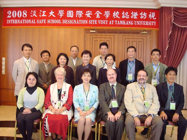 中文（台灣）: 臺北縣政府衛生局「2008淡江大學國際安全學校認證訪視」，前排左三為淡江大學校長張家宜。